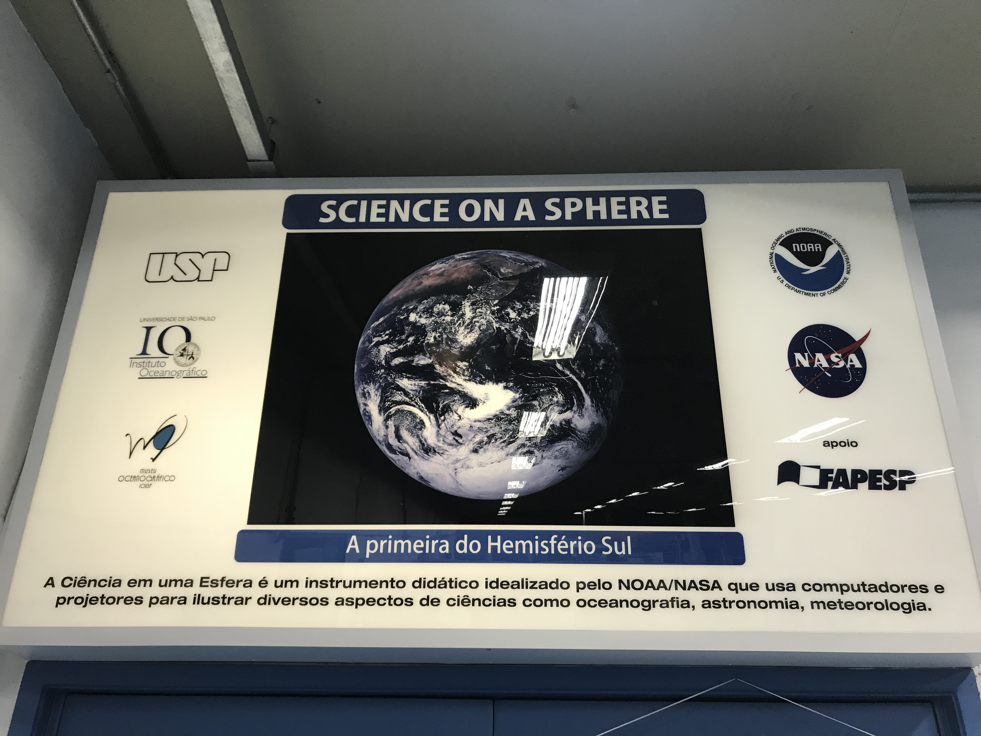 Instrumento didático idealizado pelo NOAA/NASA. Em uma sala, o visitante tem acesso à informações, através da esfera, sobre diversos aspectos das ciências ambientas com imagens de fenômenos oceanográficos, atmosféricos, geológicos e ecológicos.